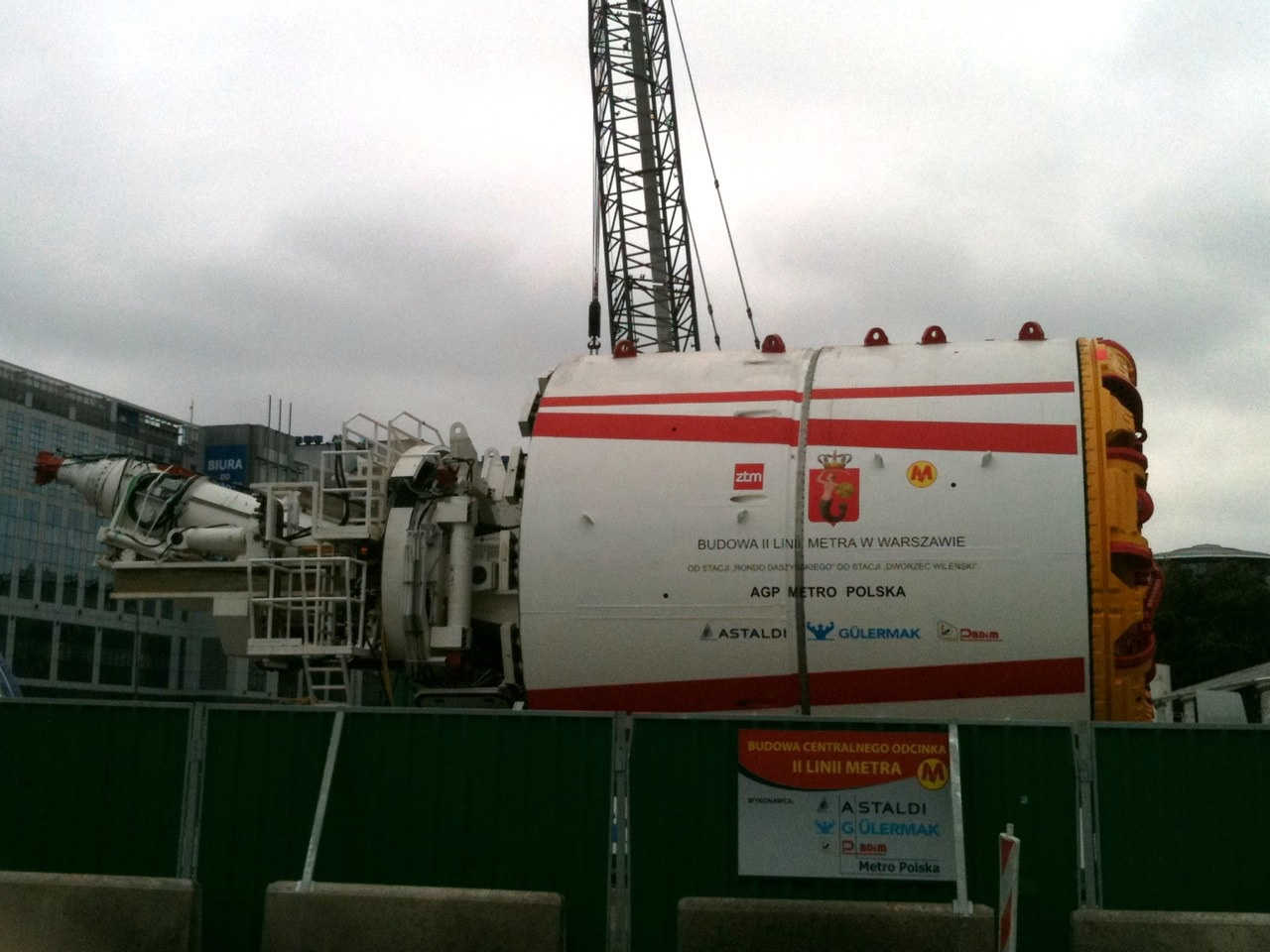 Bohrkopf Metrolinie 2 in Warschau, hier Baustelle Prosta